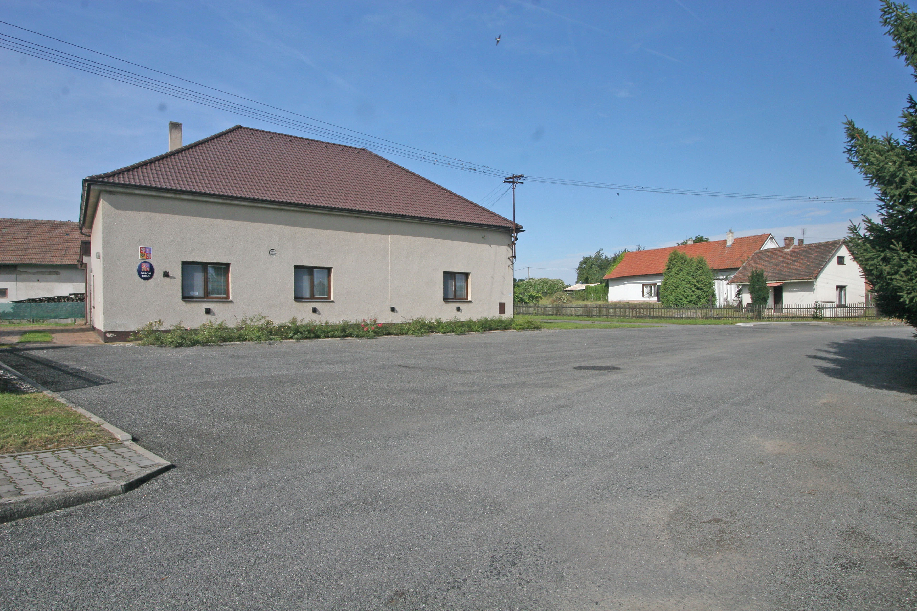 Urbanice obecní úřad